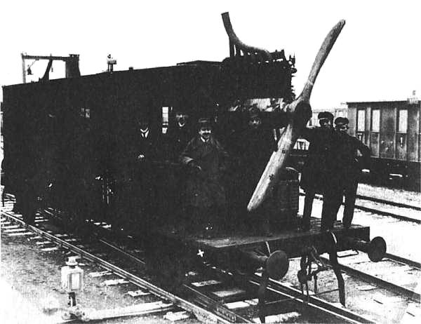 Propellor-Driven Locomotive